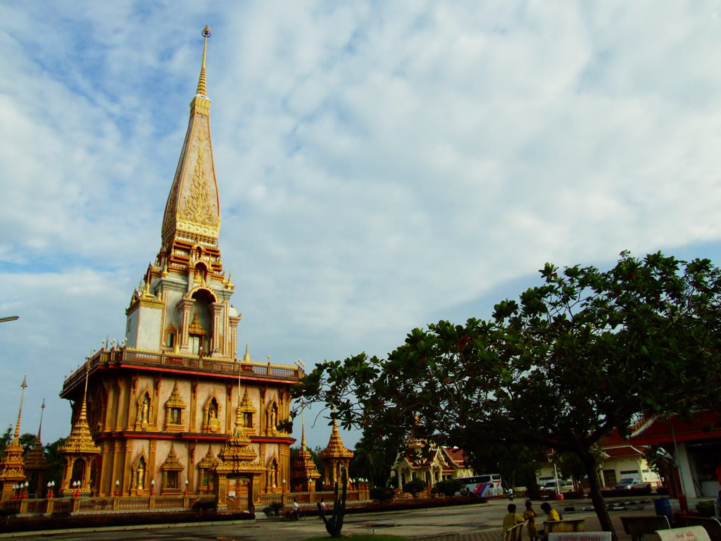 พระมหาธาตุเจดีย์พระจอมไทยบารมีประกาศ วัดไชยธาราราม จังหวัดภูเก็ต